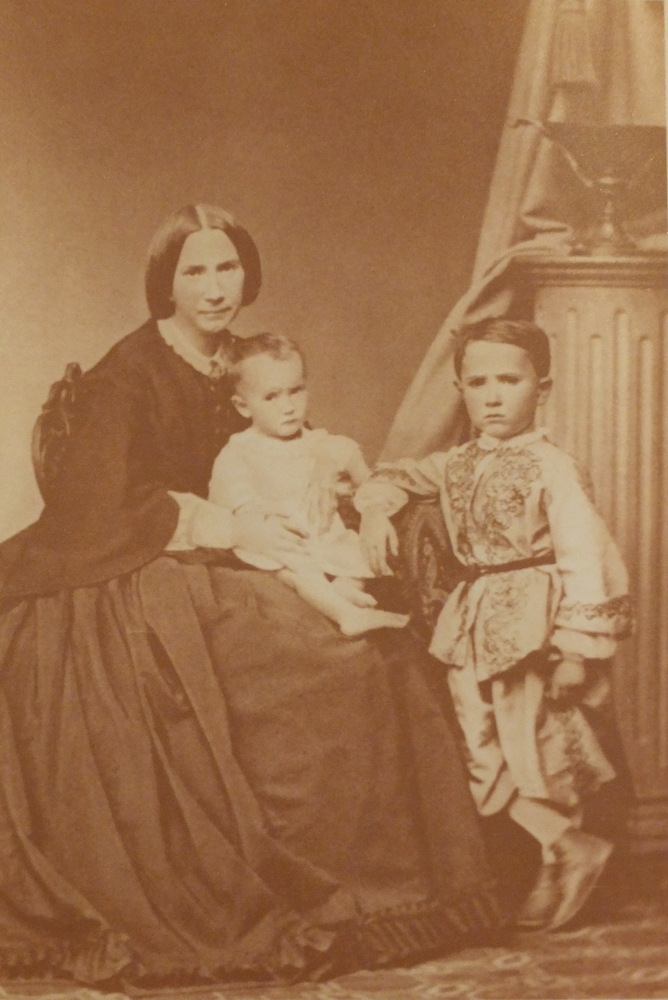 Le jeune Charles de Foucault vers 5 ans, sa mère et sa sœur cadette. Photo anonyme vers 1863, exposée dans l'église Saint-Augustin (Paris, 8e arrond.)